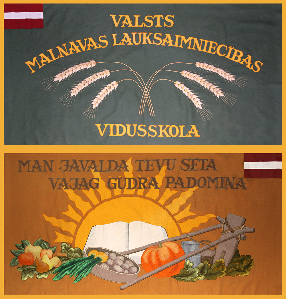 Malnavas koledžas karogs.